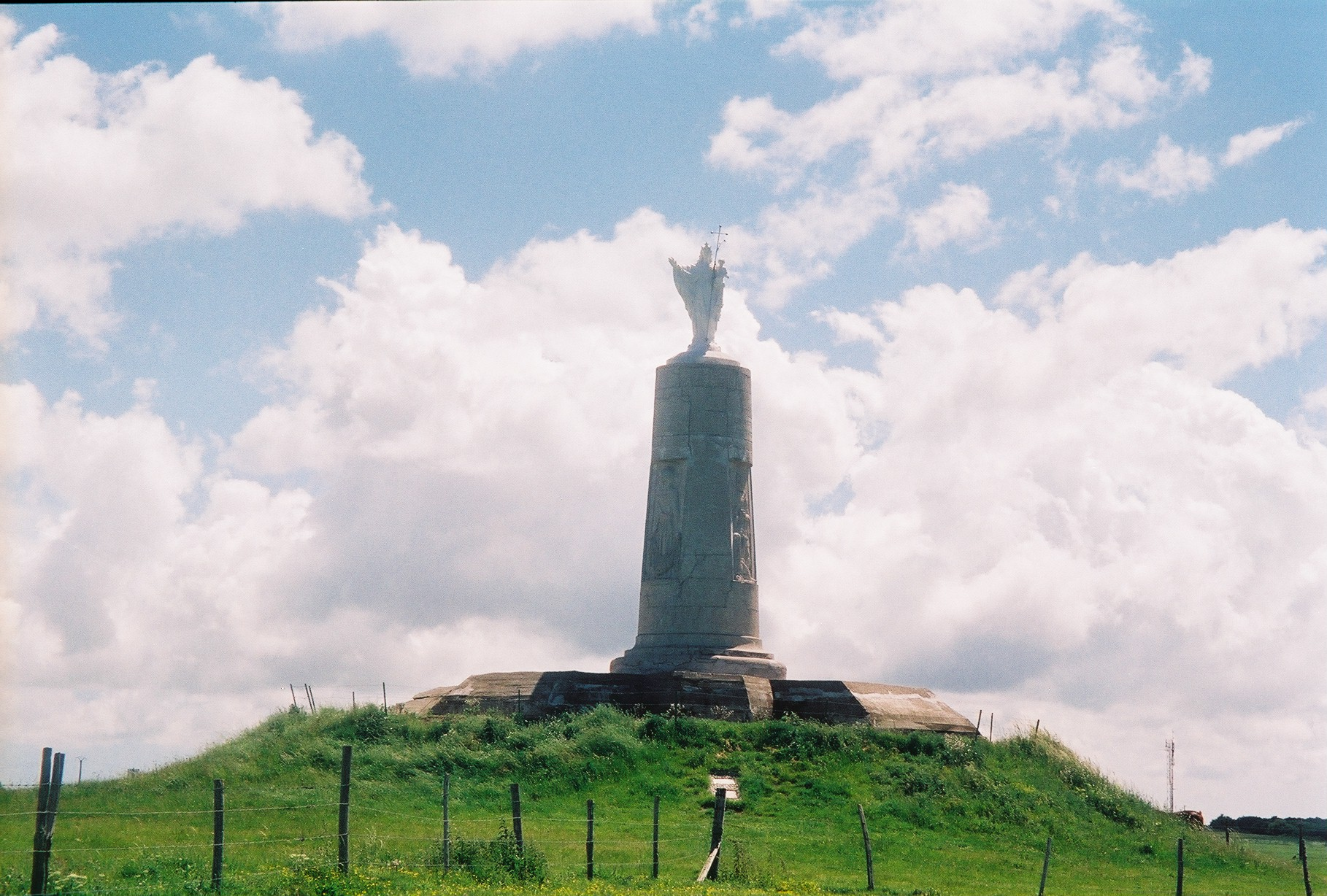 La Madone de Mers-les-Bains sur le Blockhaus.